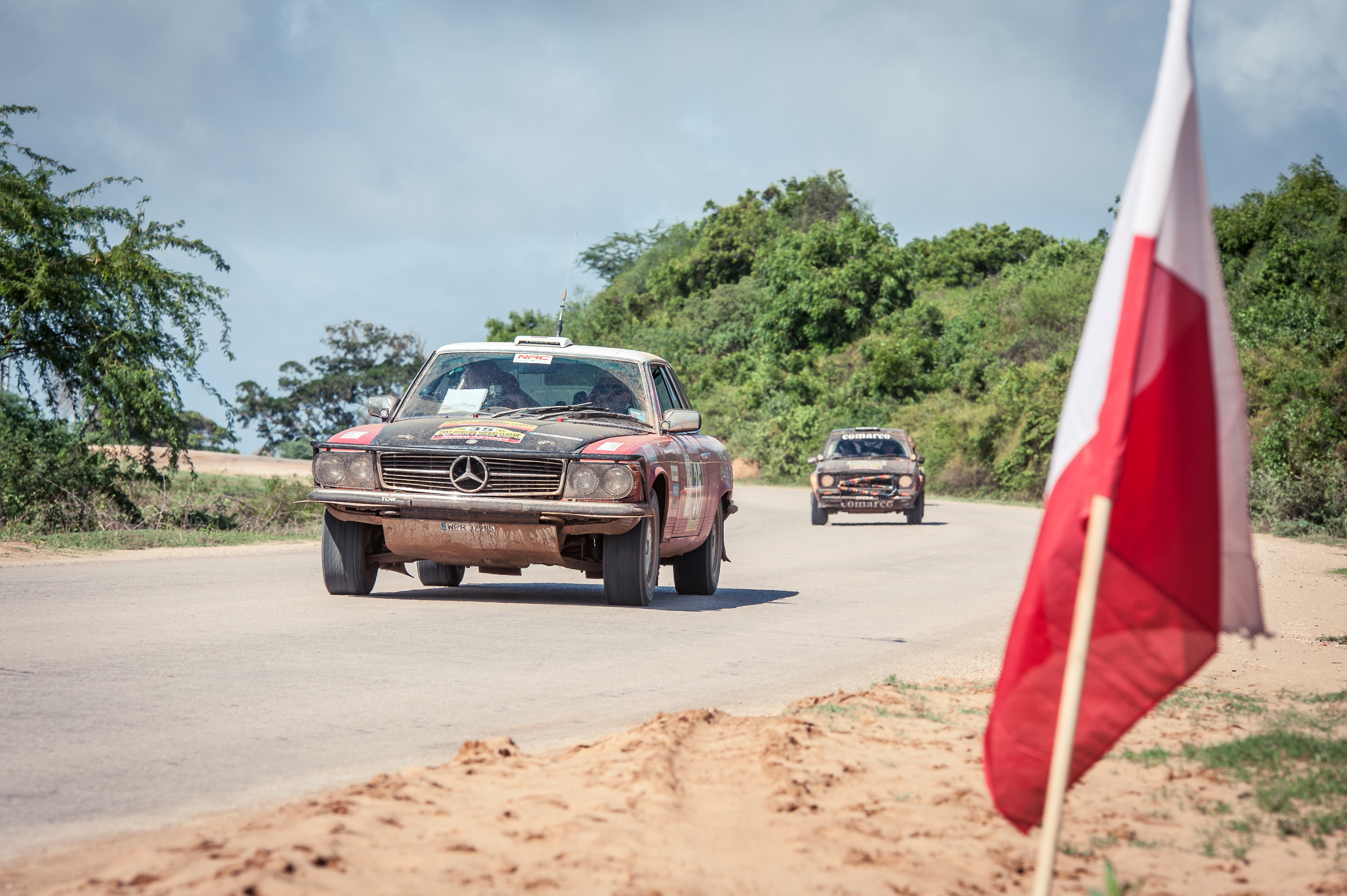 Mercedes 450 SLC